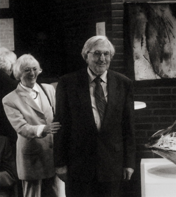 Lisa und Peter Hagenah bei der Ausstellungseröffnung 1998 (Claude Champy und Werkstatt Hohlt) in der Stadtscheune Otterndorf zwischen Arbeiten von Claude Champy